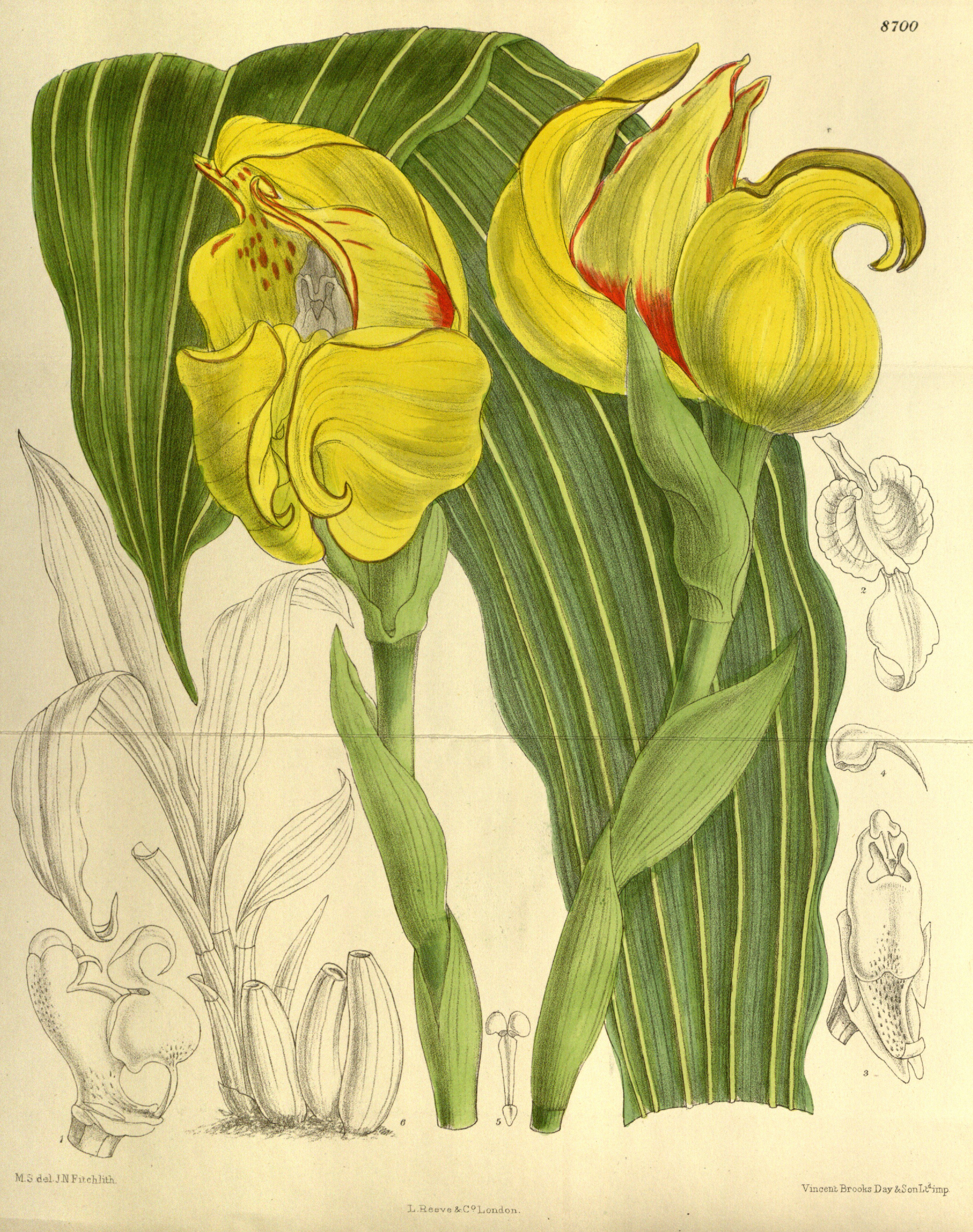 Anguloa cliftonii, Orchidaceae